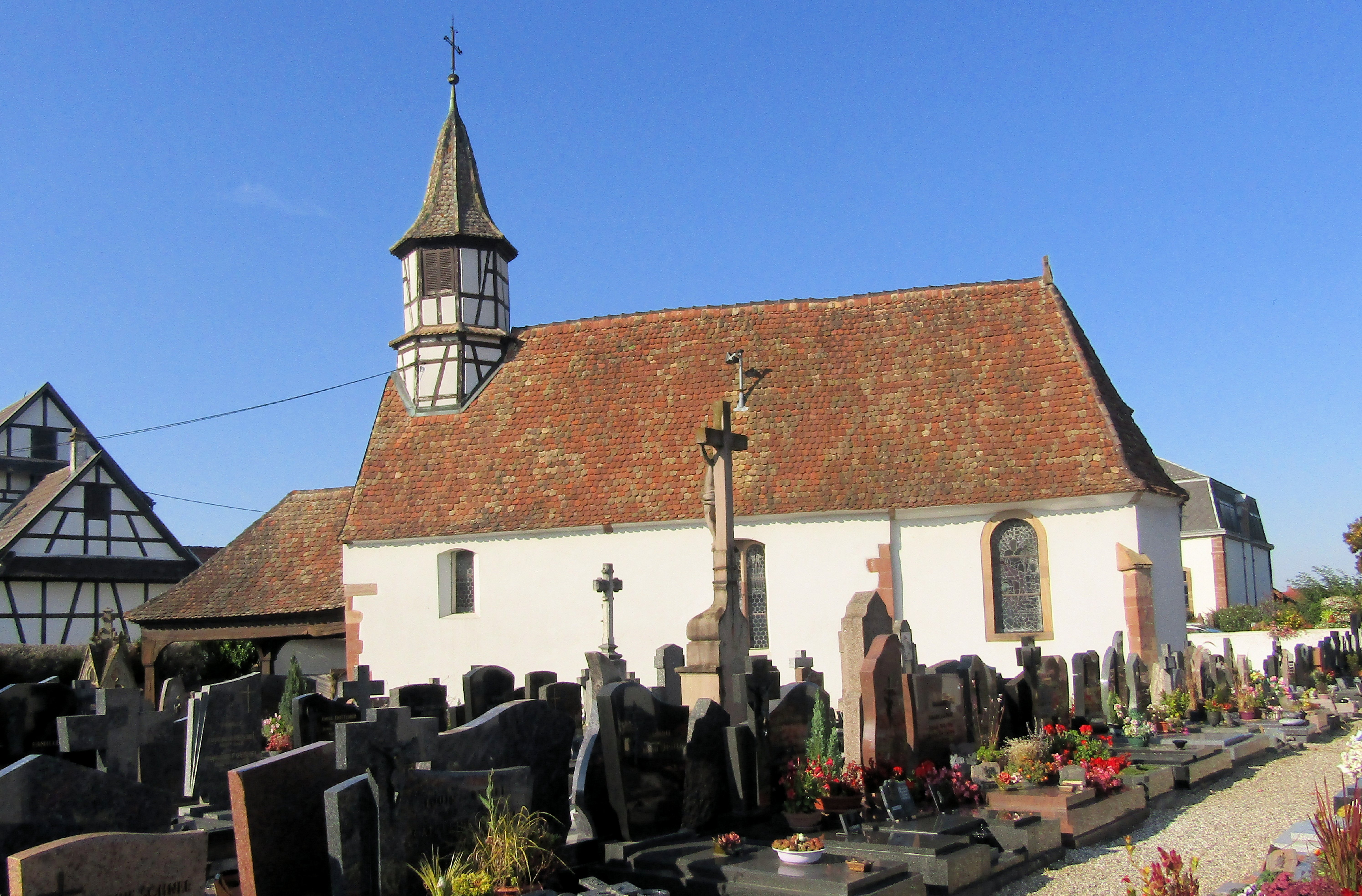 La chapelle de la Vierge à Hindisheim, côté nord